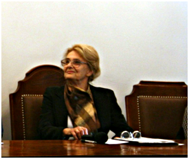 Barbara Bartkowicz